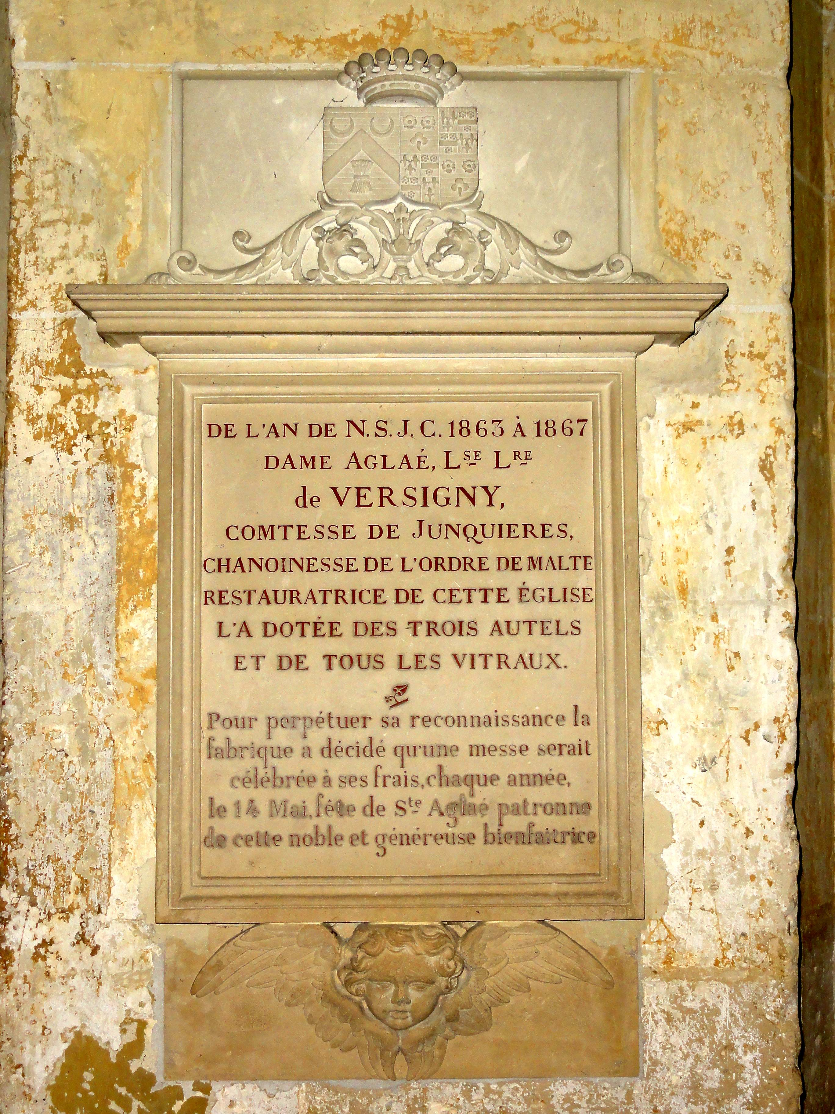 Mobilier de l'église (voir titre).